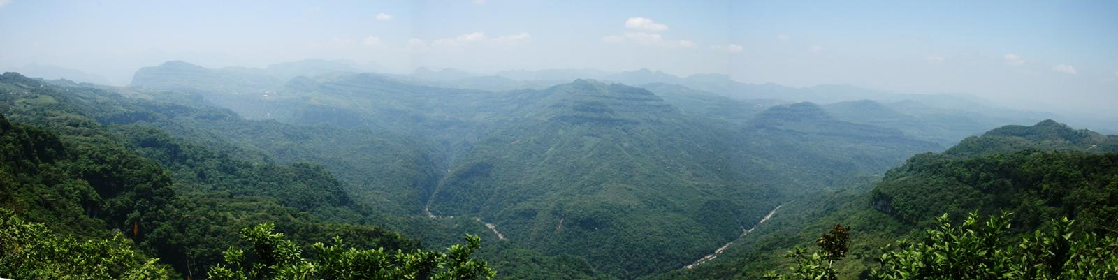 Región del río Cempoala con vegetación estable de selva mediana y alta perennifolia, con fragmentos de encinar tropical y bosque de pino.